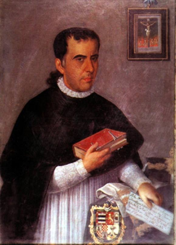 Antonio Larrazábal y Arrivillaga en 1812.